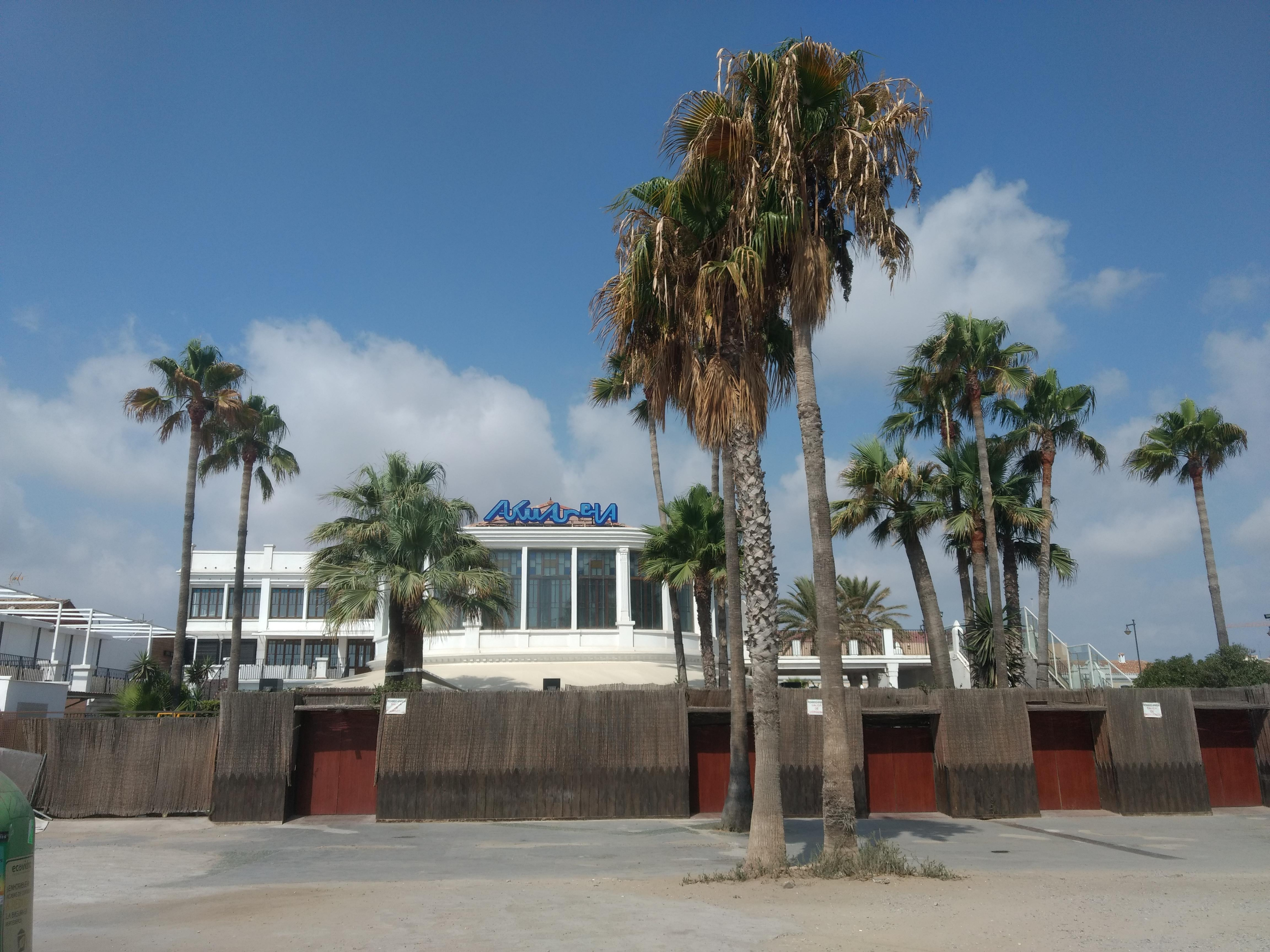 La discoteca Akuarela Playa, antiga ACTV (altres noms: Tropical, Luna Rossa ...)